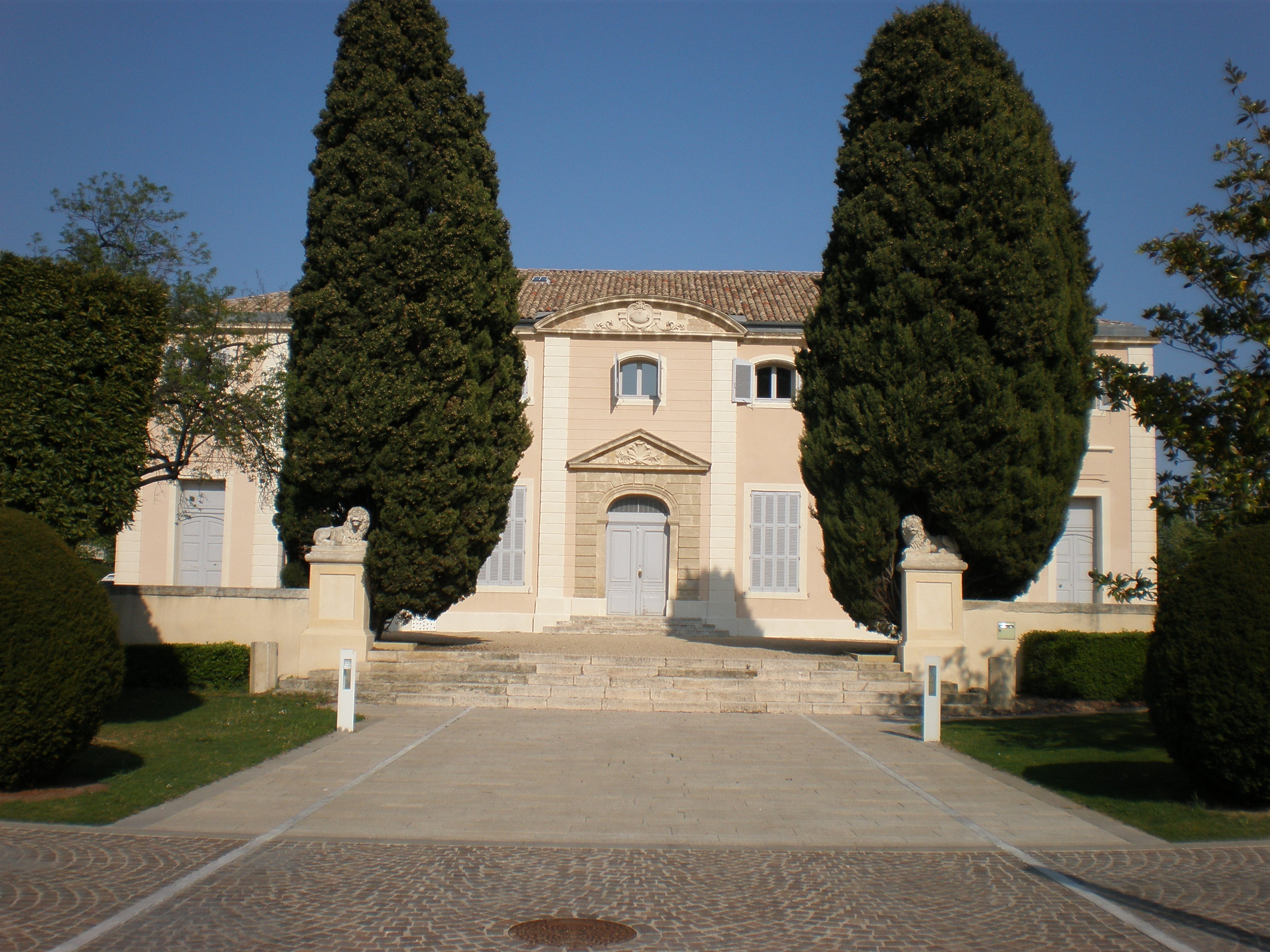 Le Château d'Alco à Montpellier (Hérault - 34)